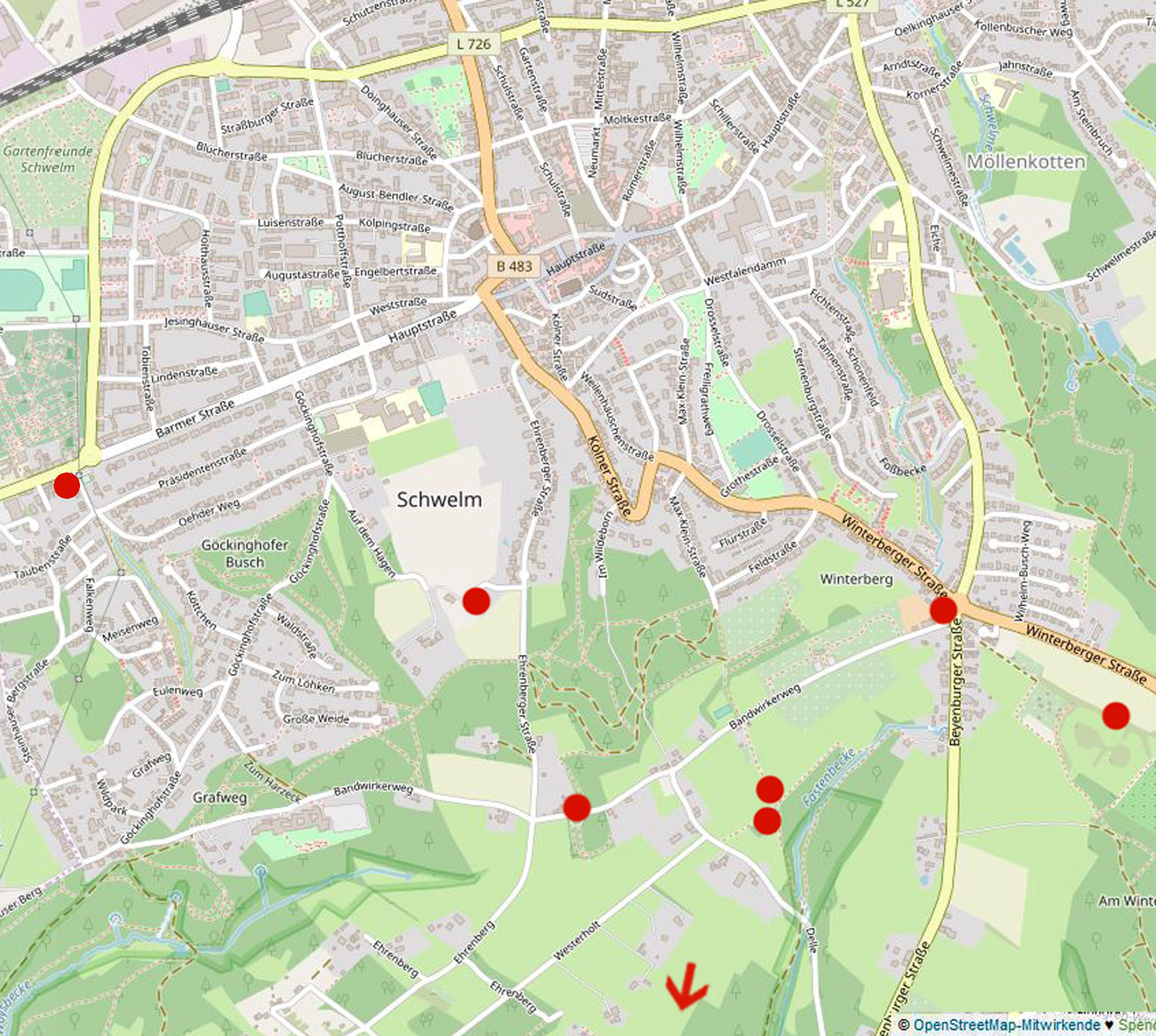 Lage von Bau- und Bodendenkmälern in Schwelm, Bereich äußere Stadt südlich. (Unten außerhalb ergänzen sich noch die Bodendenkmale Weuste, Vesterberg, Weberstal.) Kartenvorlage aus OpenStreetMap wurde um Markierungen (rot) ergänzt.